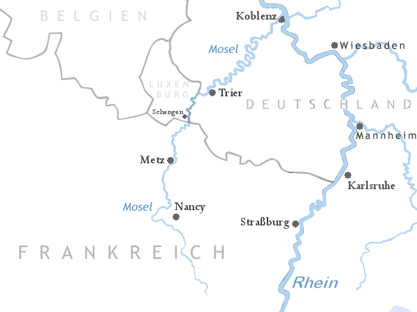 Karte der Mosel Datum der Erstellung: 29.06.2006